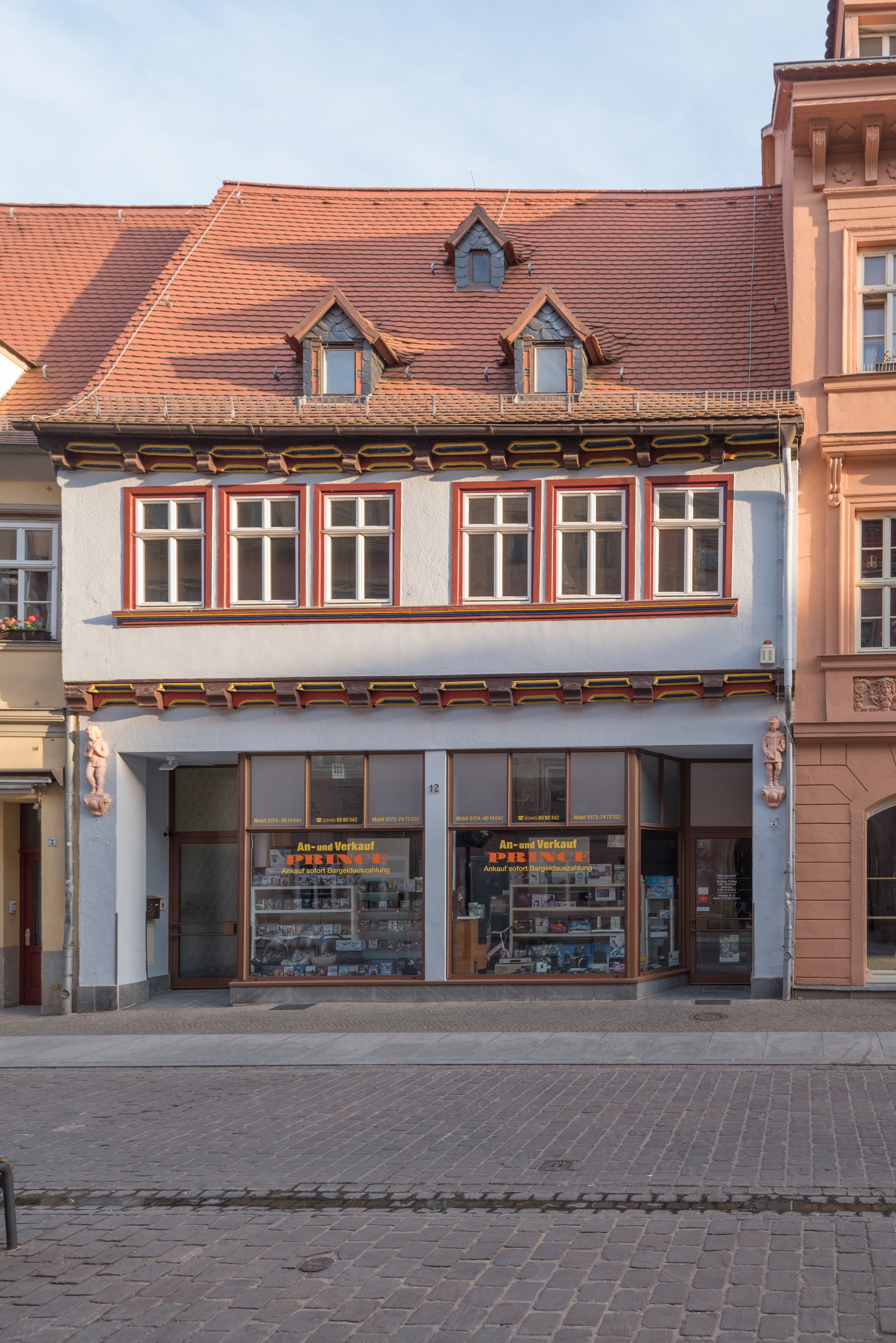 Naumburg (Saale), Jakobstraße 12